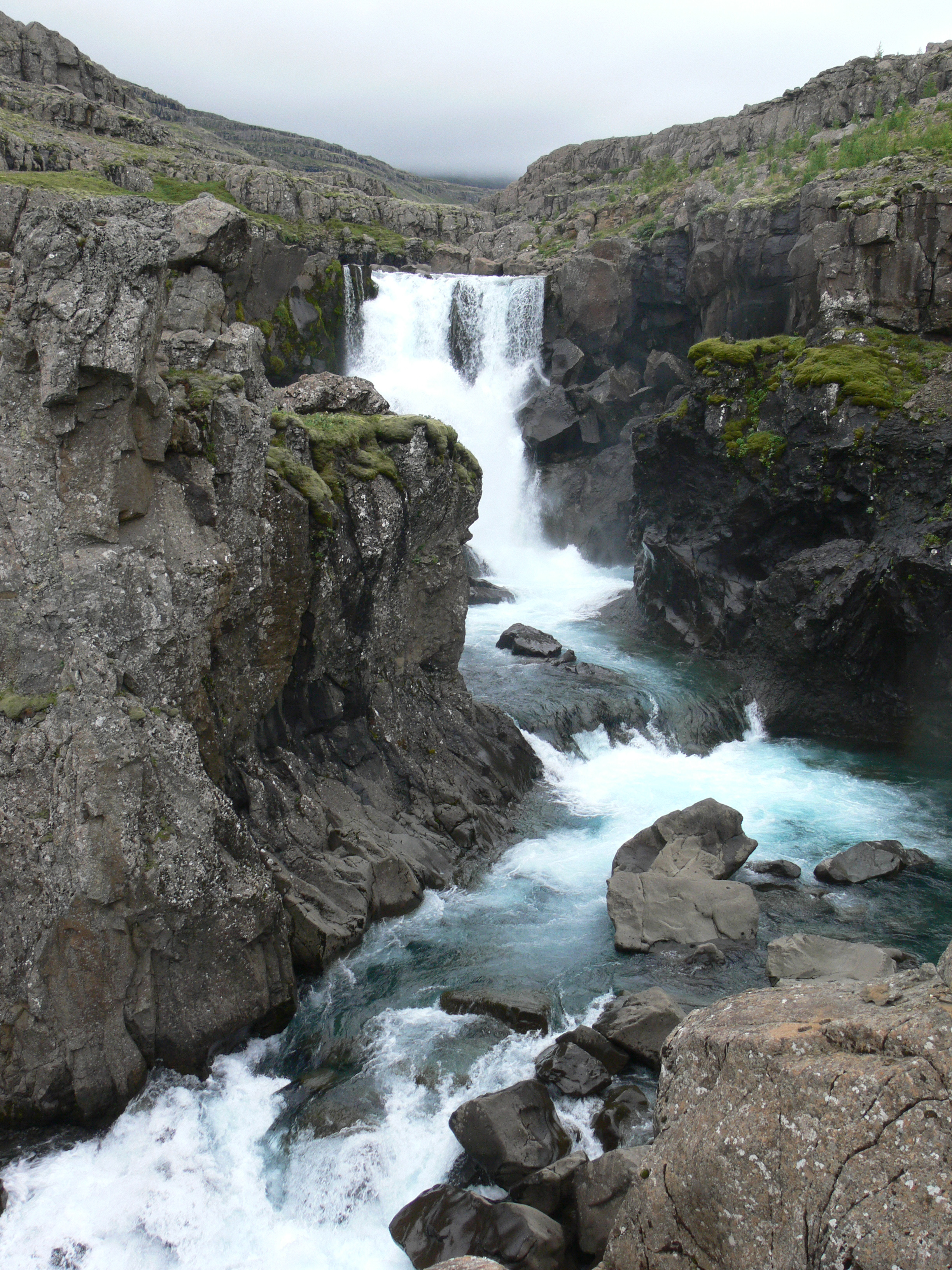 Wasserfall der Berufjarðará